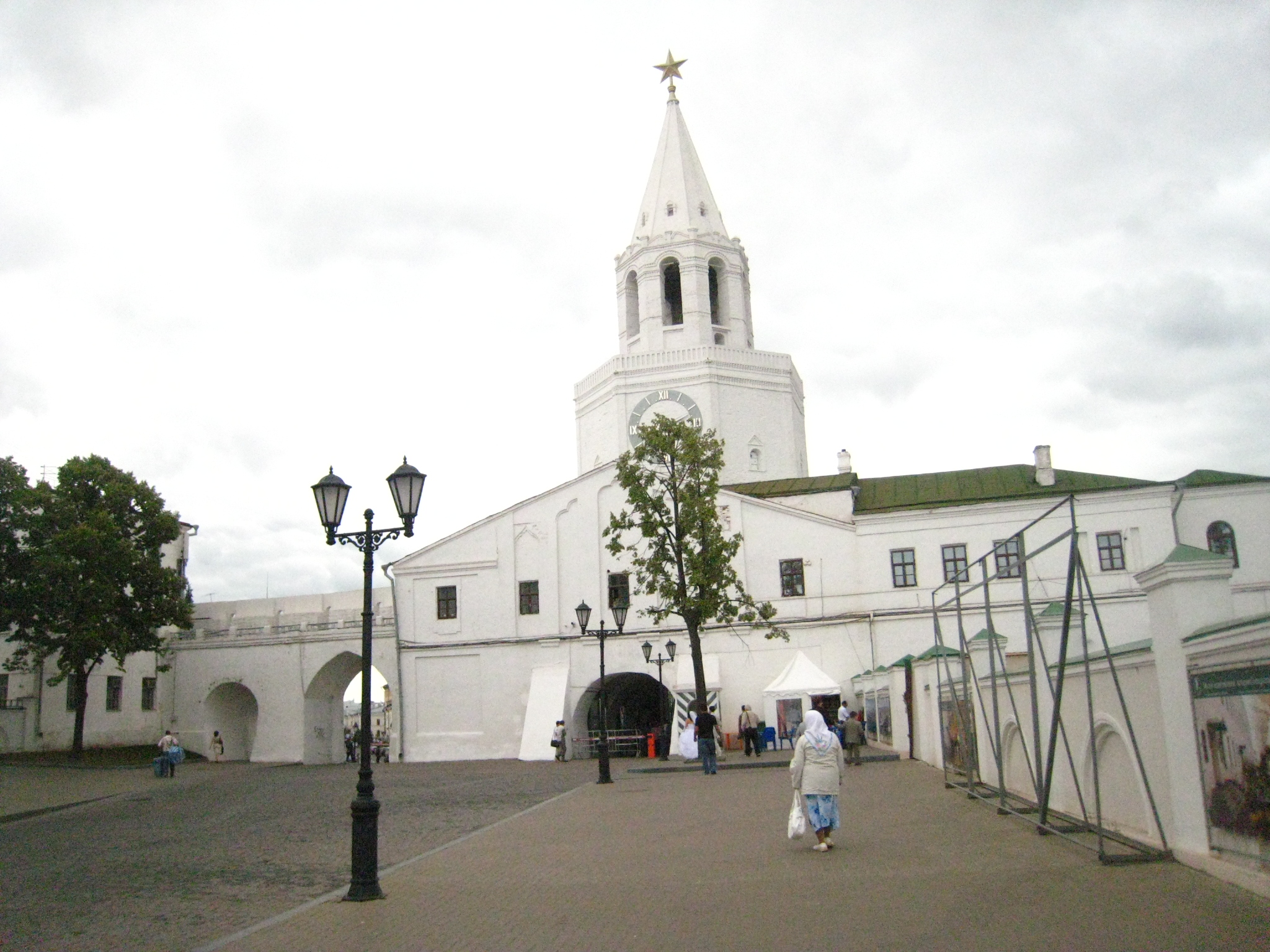 Спасская башня